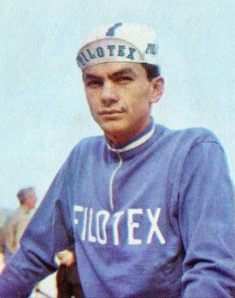 CAMPIONI dello SPORT 1966/67-Figurina n.230- MUGNAINI - CICLISMO -Rec